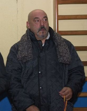 Ex árbitro internacional español Joaquín Ramos Marcos.